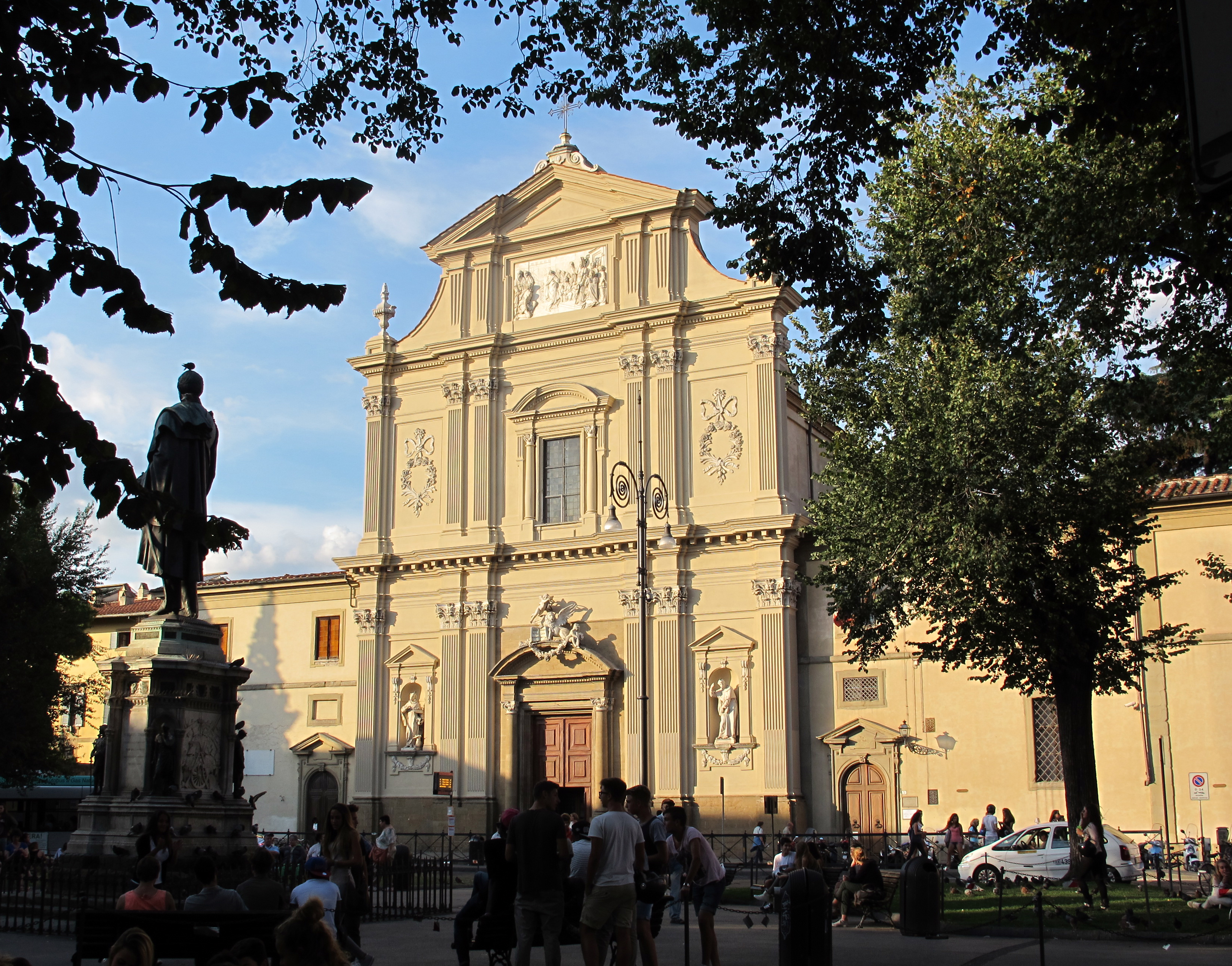 Firenze